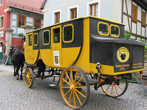 Die Sächsische Pferdepersonenpost macht Station im Radebeuler Stadtteil "Altkötzschenbroda".